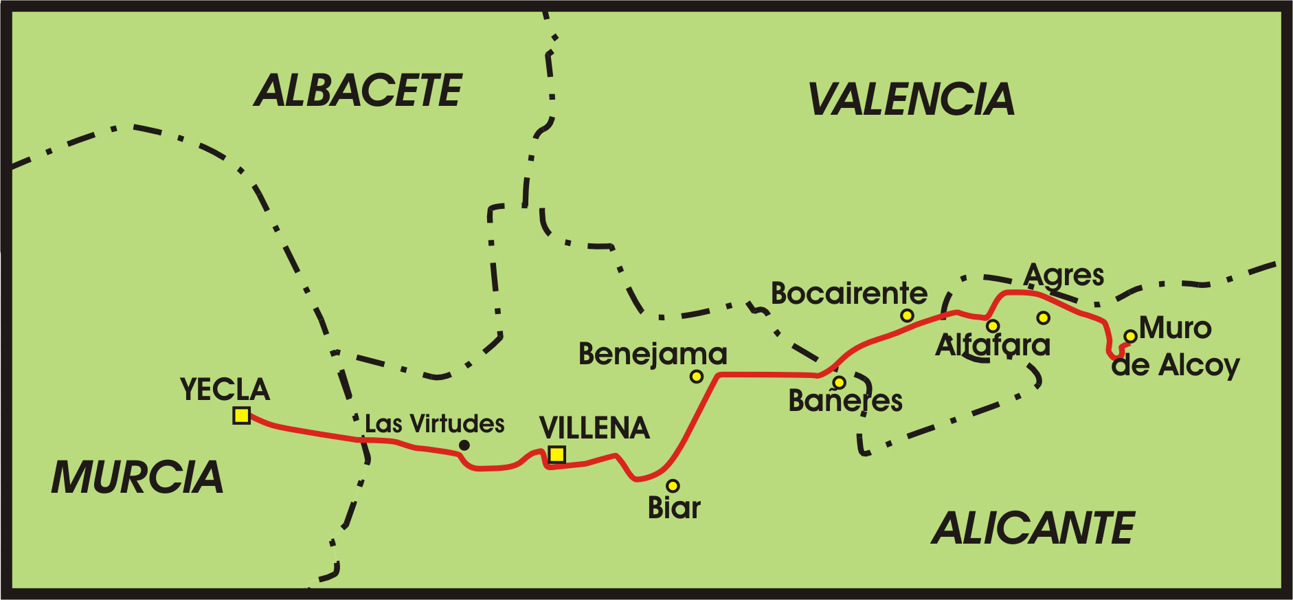 Trayecto que recorrían las antiguas vías del Chicharra